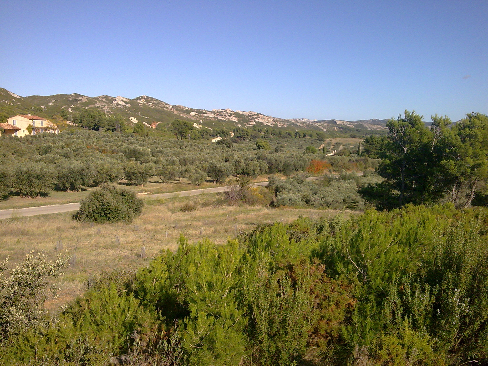 Le quartier des Fléchons, commune de Maussane.